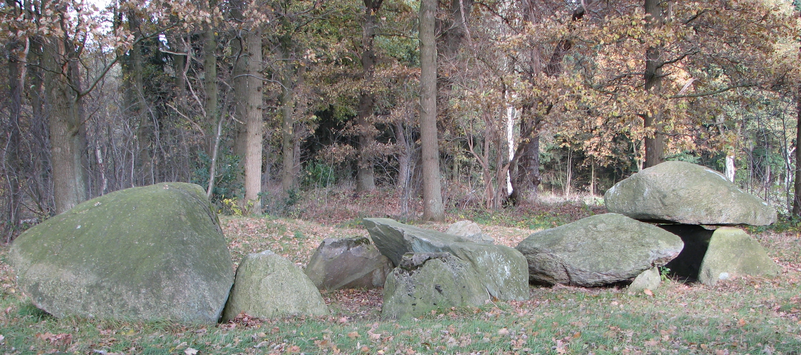 Hunebed (Dolmen) D32 at Odoorn (Netherlands)